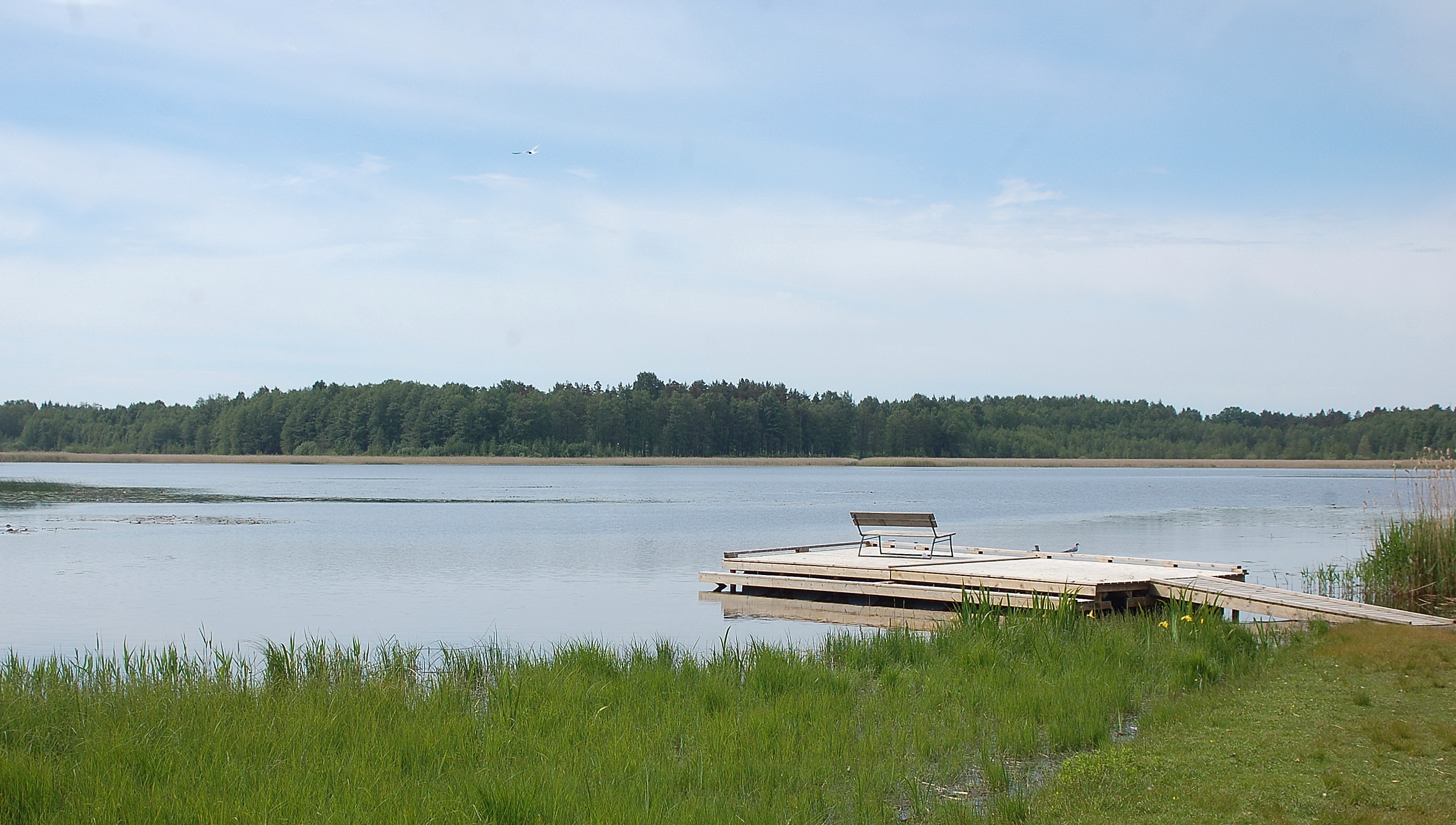 Sättersviken från Klenegårdens strand.